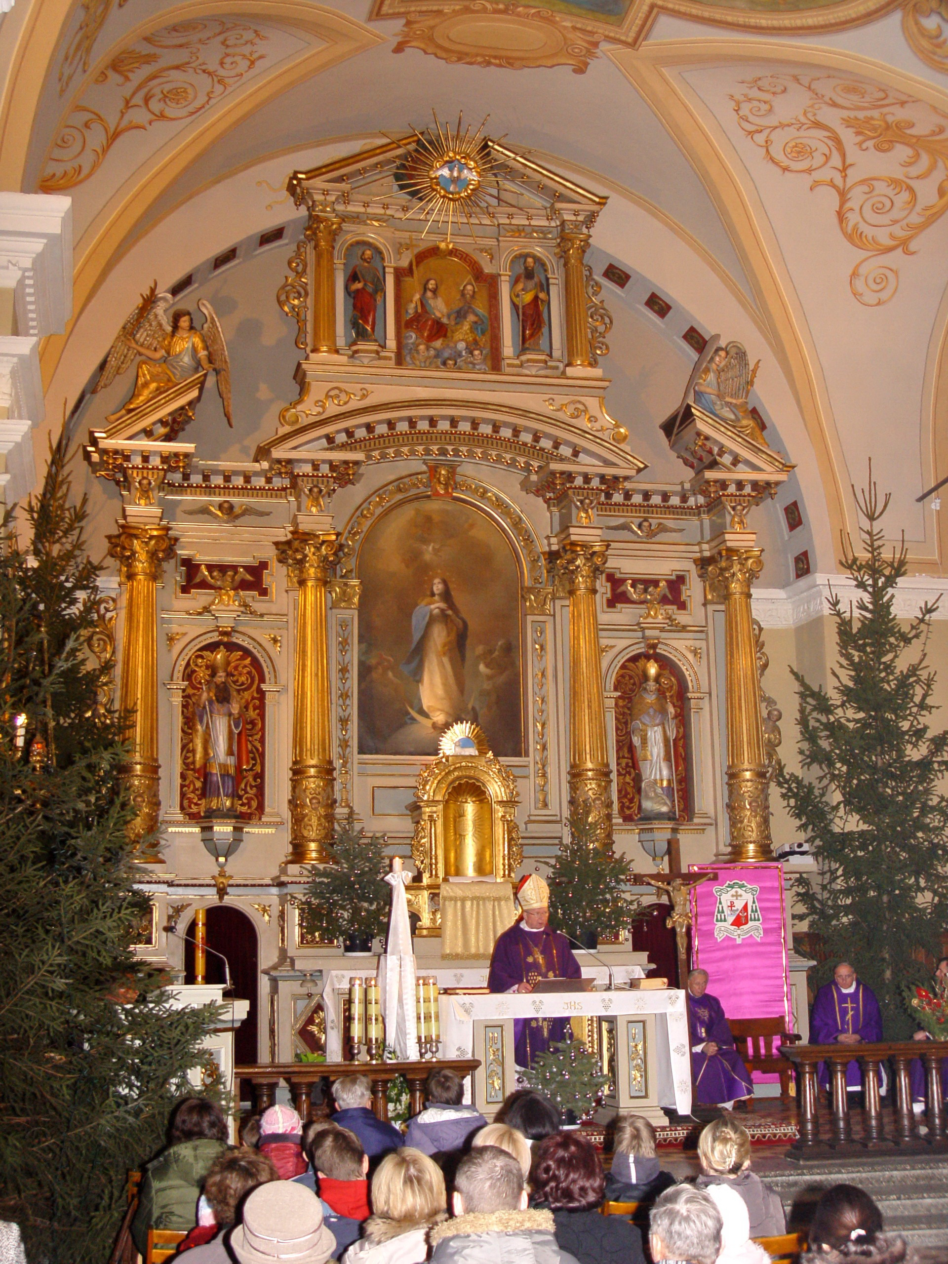 Ołtarz główny z 1804r. w kościele Niepokalanego Poczęcia Najświętszej Marii Panny w Busku-Zdroju. Obraz NMP autorstwa Franciszka Smuglewicza. Zdjęcie wykonane w trakcie mszy świętej, odprawianej przez biskupa ordynariusza kileckiego ks. prof. Kazimierza Ryczana w dniu 22 grudnia 2007r.